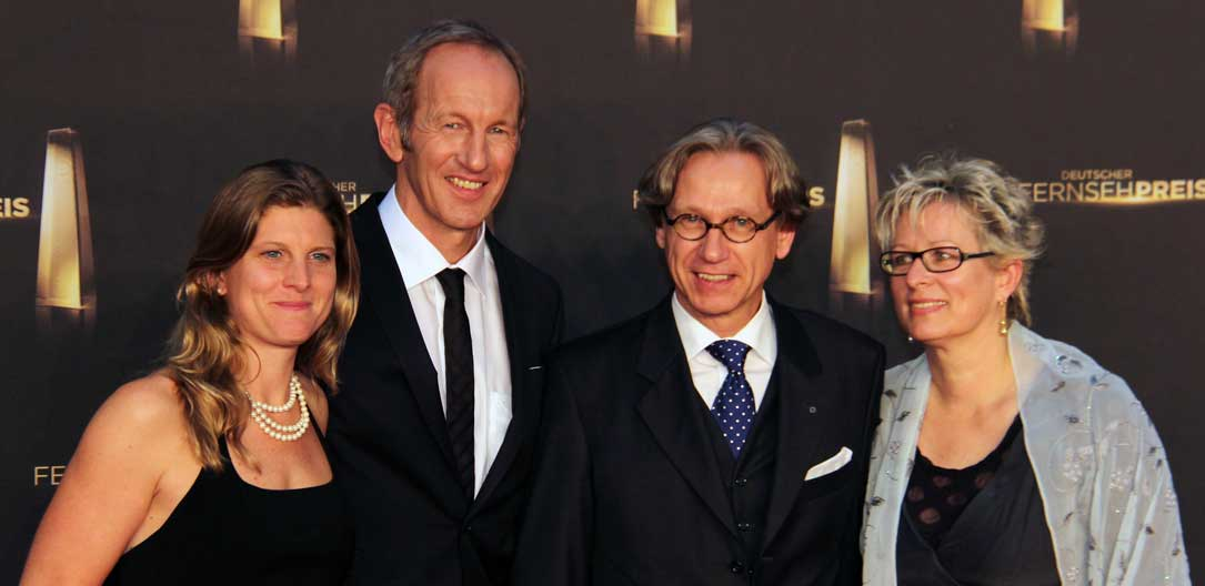 Ralf Scholt (2. von links) und Begleitung beim Deutschen Fernsehpreis 2012